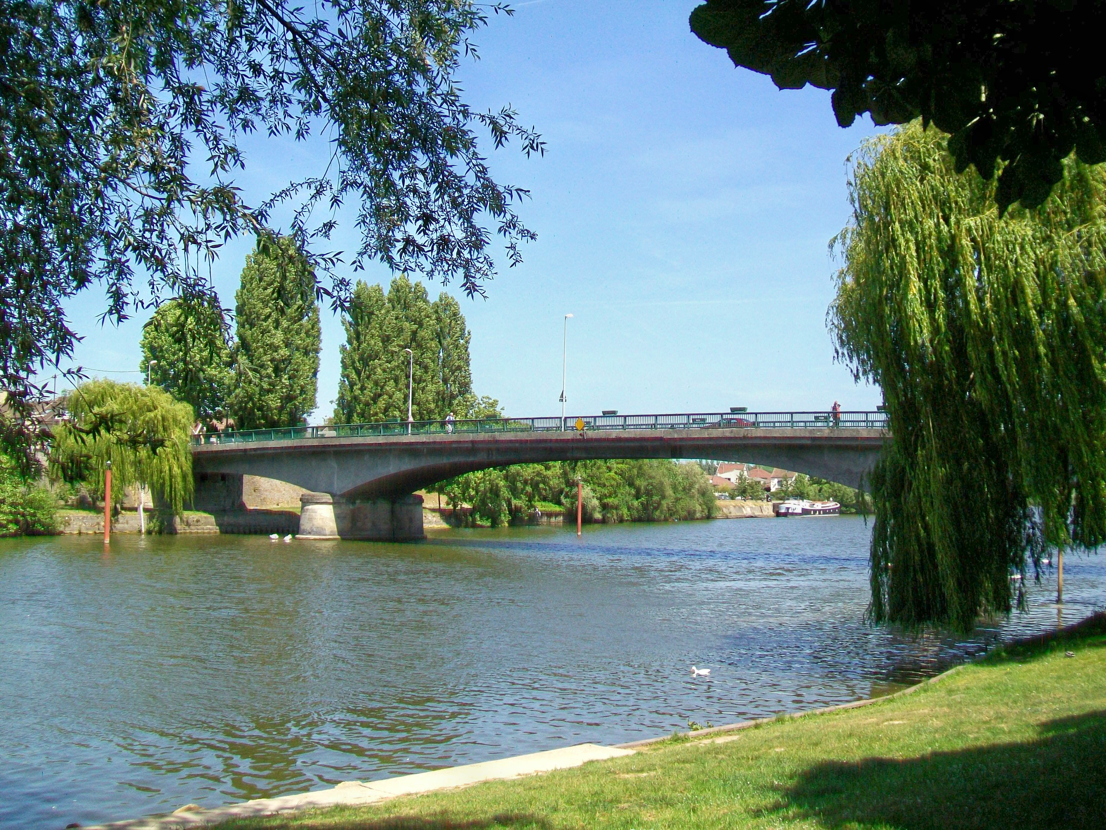 Le pont sur l'Oise entre Beaumont-sur-Oise et Persan.